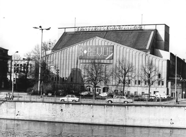 Berlin, Friedrichstadtpalast ADN-ZB Deutsche Demokratische Republik 10.11.1972 Friedrichstadt-Palast in der DDR-Hauptstadt Berlin. Unmittelbar am Ufer der Spree gelegen präsentiert sich das größte Varieté-Theater der Deutschen Demoktratischen Republik, der Friedrichstadt-Palast (unser Foto). Die Vergangenheit dieses Gebäudes ist so kunterbunt wie das monatliche Programm des Hauses. Im Jahre 1869 wurde es als Markthalle errichtet, die dann später einem Zirkus als Etablissement diente. Das 1919 von Poelzig daraus erbaute Große Theater wurde im zweiten Weltkrieg schwer zerstört. In vereinfachter Form wiederaufgebaut dient es etwa 25 Jahre als Varieté, in dem etwa 3000 Besucher Platz finden. Foto: Kaufhold Copyright: ADN-Zentralbild